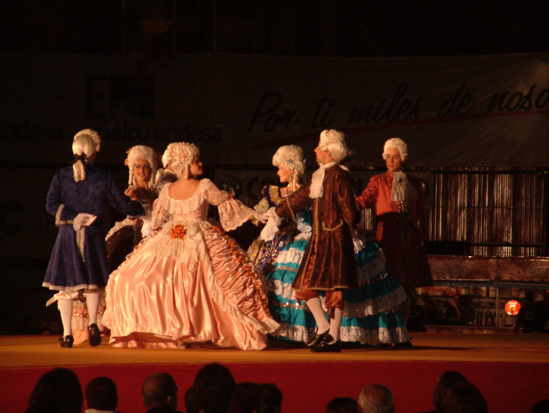 Festival del Siglo XVIII o Minué. (Obra: Minué de los Aires en Re de Luis Cobiella Cuevas). 13 de junio de 2005. Santa Cruz de la Palma. Bajada de la Virgen de las Nieves 2005.